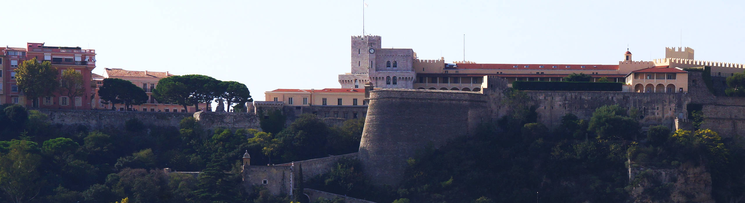 Nordost-Ansicht von Wehranlagen unterhalb des Fürstenpalastes vom Fürstentum Monaco - Foto Wolfgang Pehlemann DSCN9676